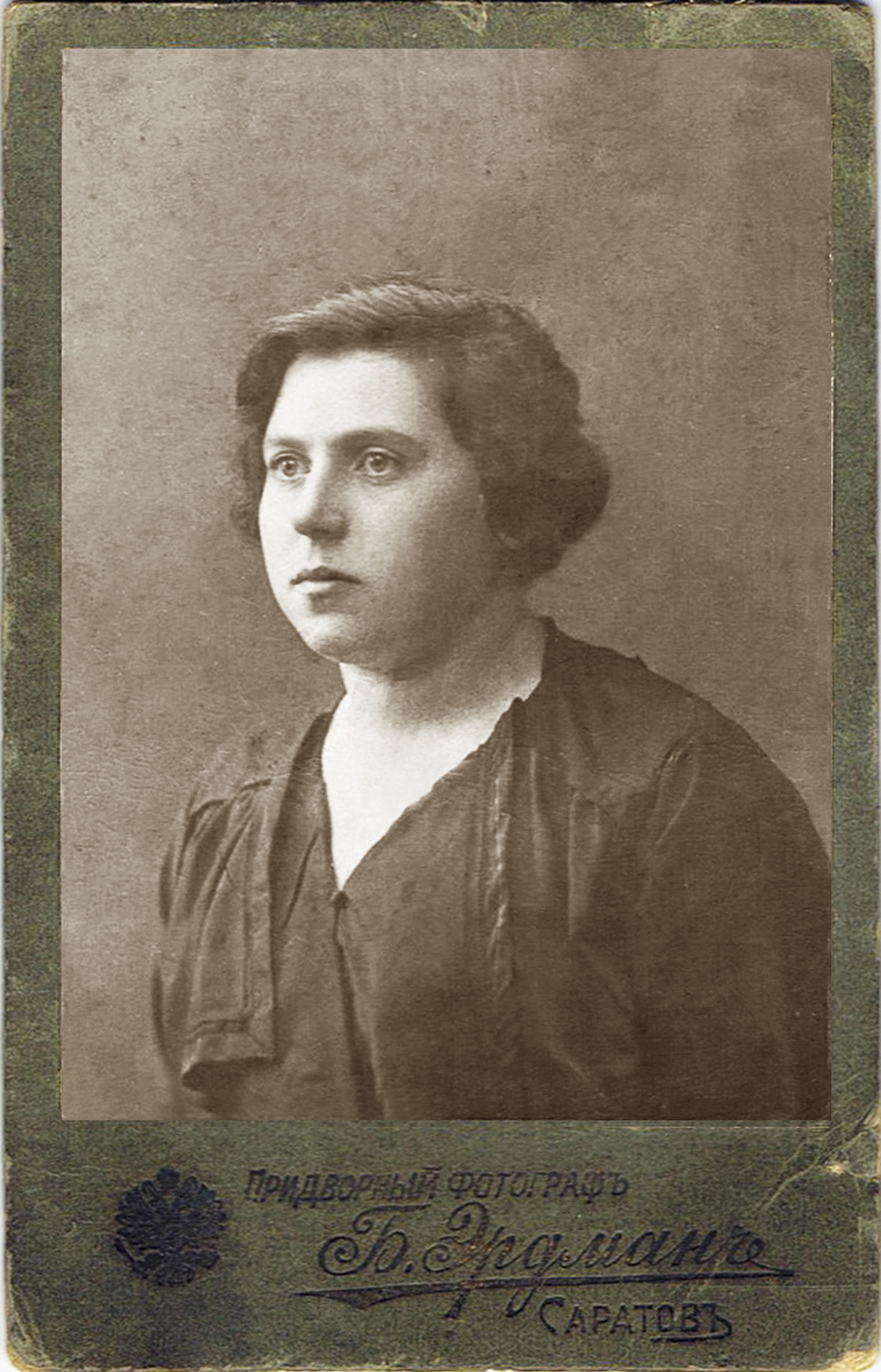 профессор педиатрии Эдда Абрамовна Горницкая